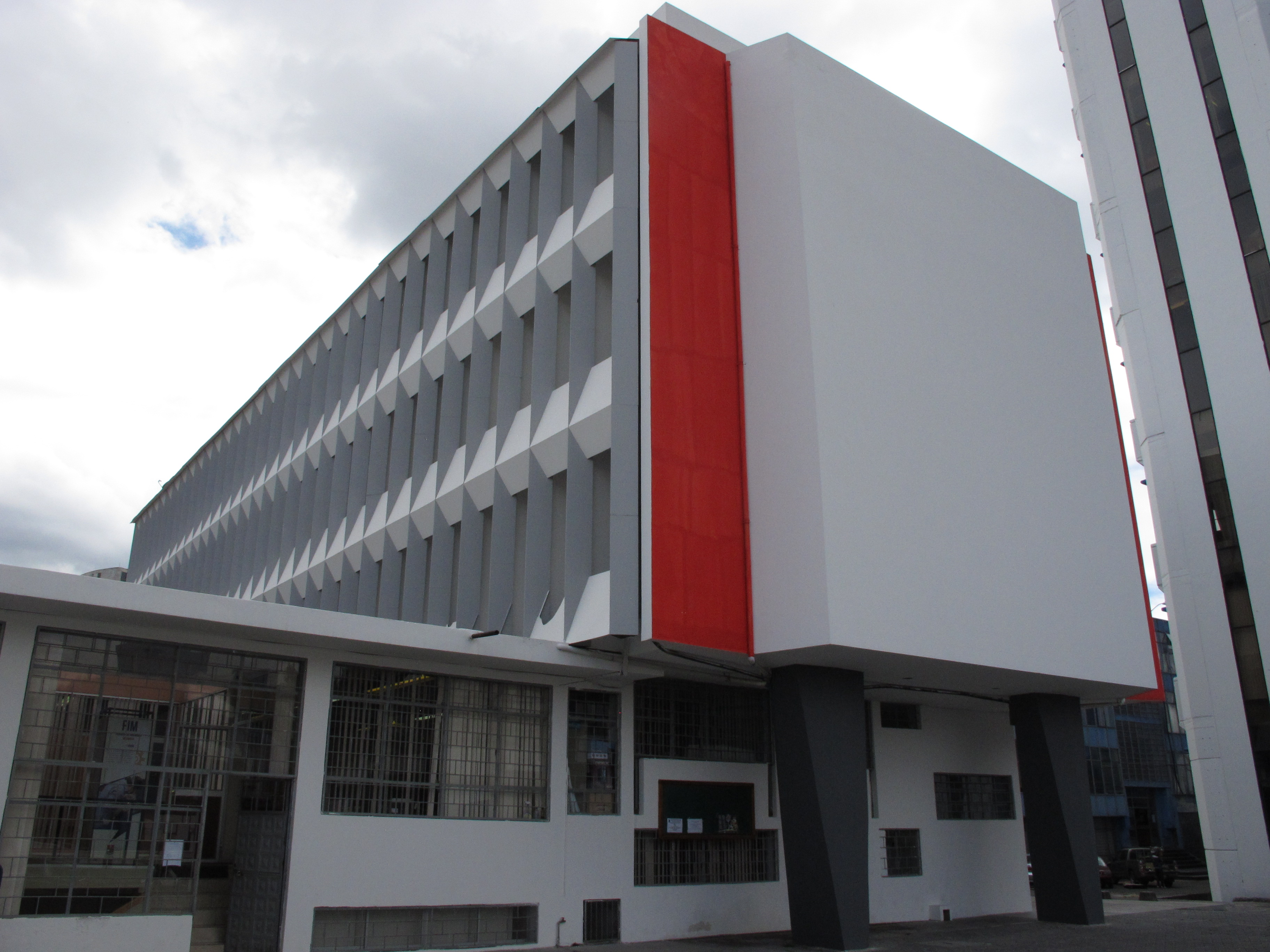 Facultad de Ingeniería Mecánica, Escuela Politécnica Nacional Quito, Ecuador.